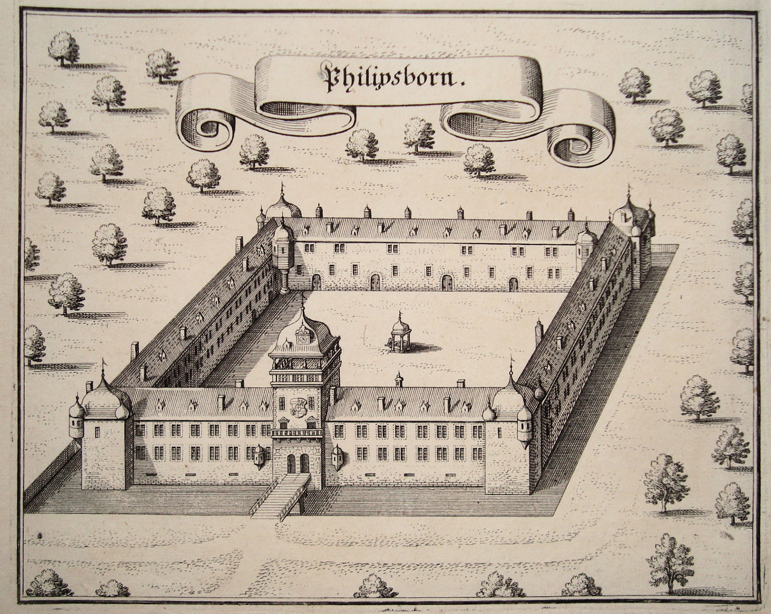 Schloss Philipsborn (aus: Zeiller, Martin: " Merian, Matthaeus :Topographia Palatinatus Rheni ..." (1645 [i.e. wohl 1672])